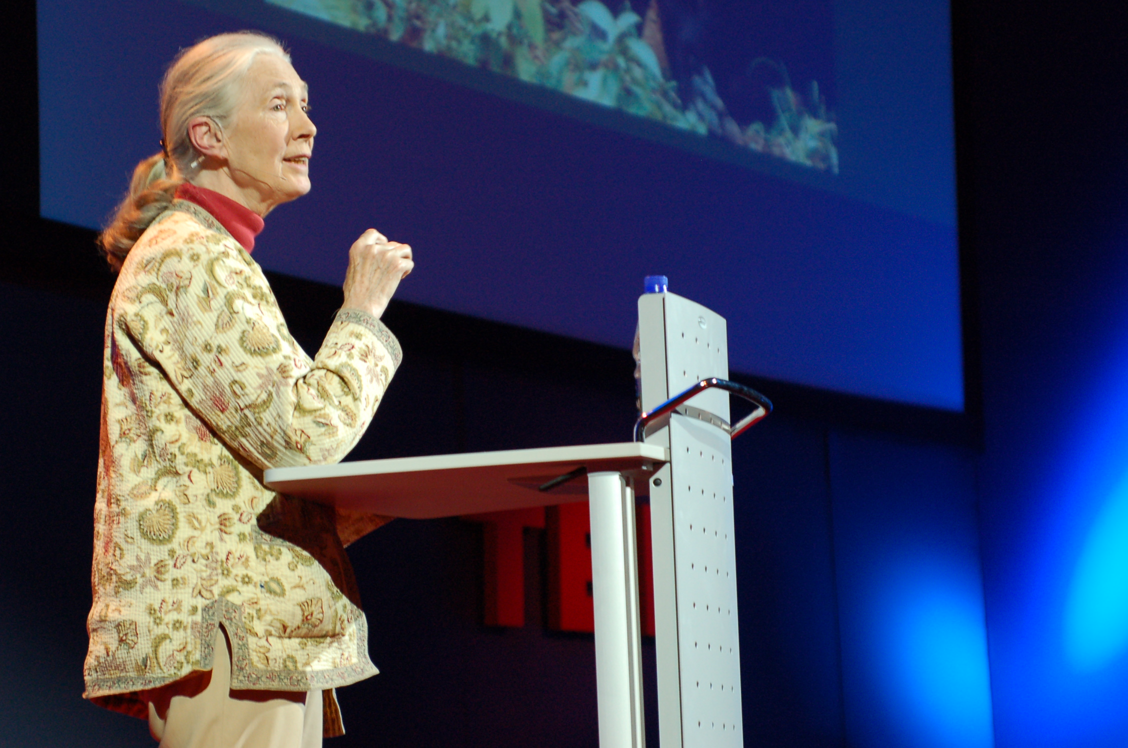 Jane Goodall, britische Verhaltensforscherin, auf der TEDGlobal 2007 in Arusha, Tansania